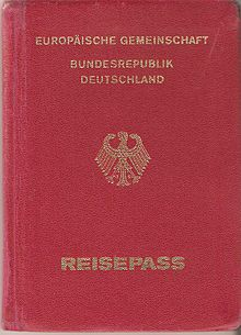 جواز نازي